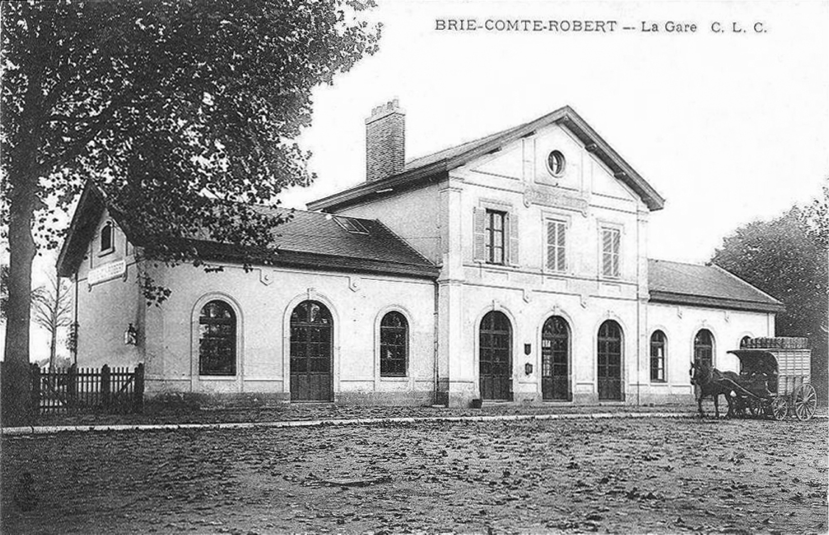 Extérieur de la gare d Brie-Comte-Robert au début des années 1900.